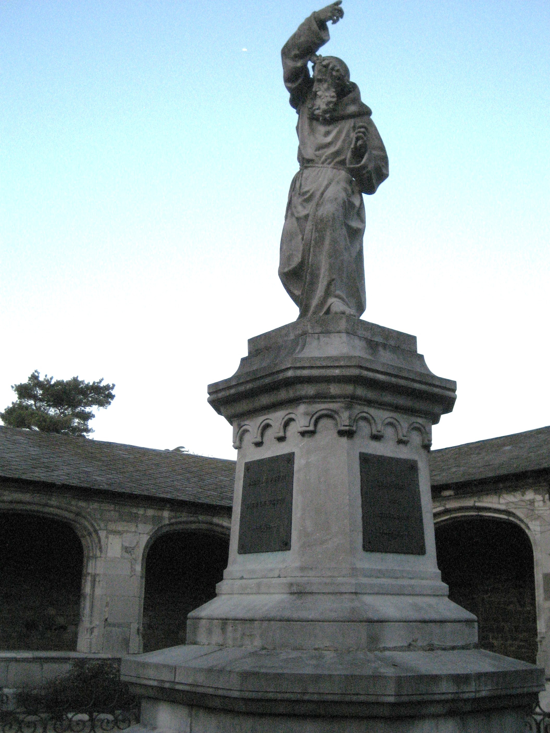 Statue de Pierre l'Ermite au Neufmoustier à Huy